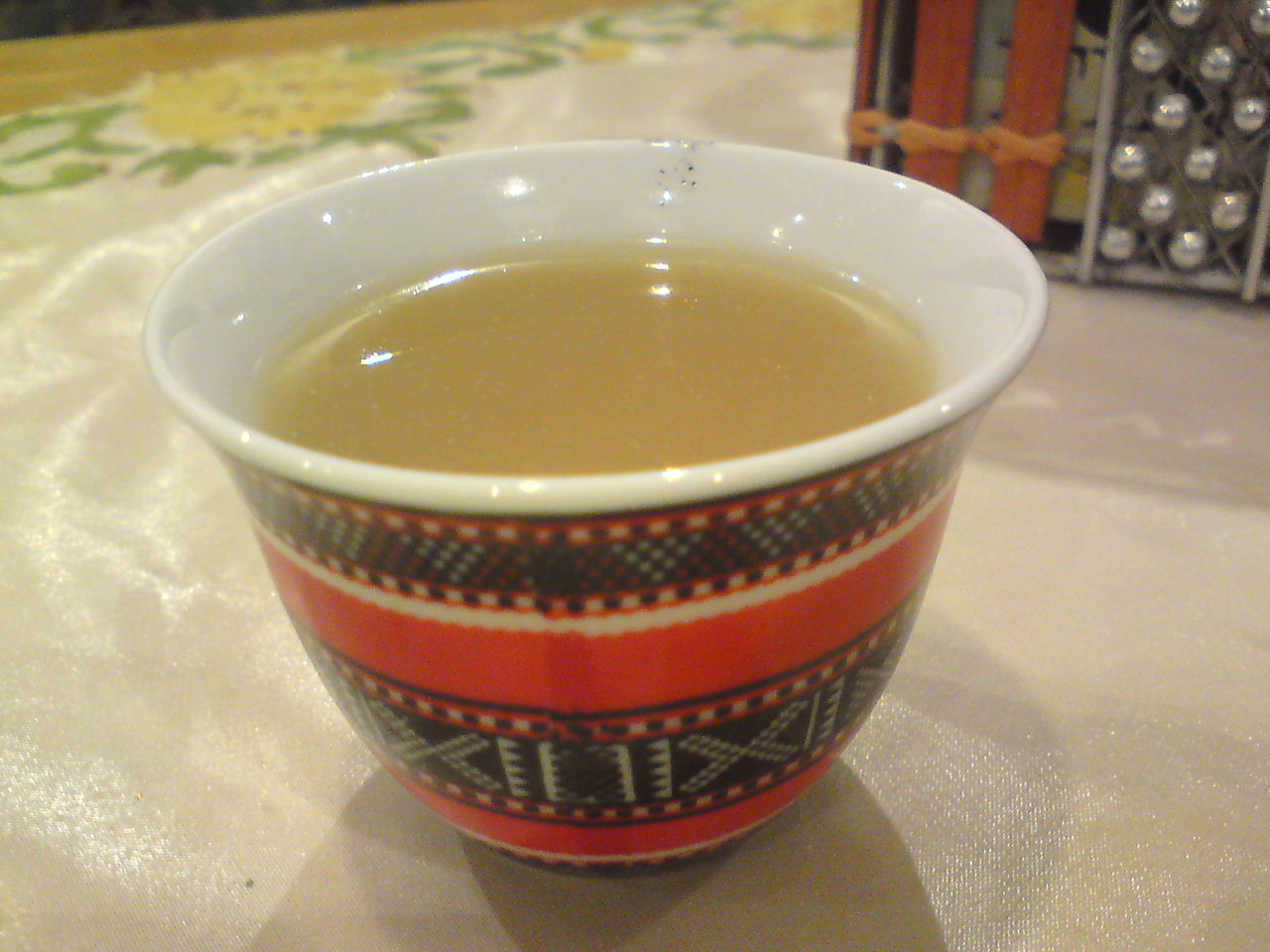 فنجال قهوة عربية